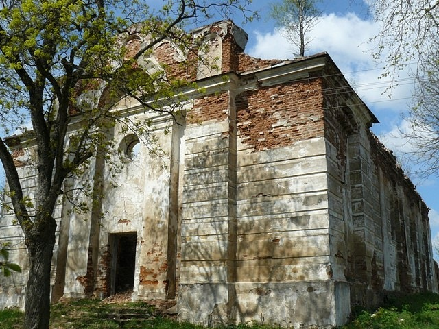 Руины костела Вознесения Девы Марии, д.Дуброво, Молодечненский район, Минская область. Фото путешествия по Беларуси.